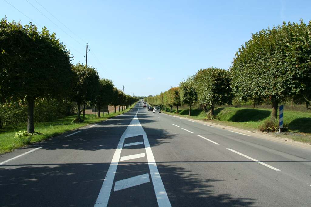 Route de quarante sous à Orgeval - Yvelines (France)